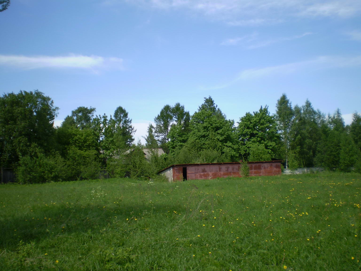 Сейчас — «Магнитка», Магнитная станция. Место пересечения Дороги Жизни, Мельничным ручьём. До революции — деревня Мельничьи Ручьи.